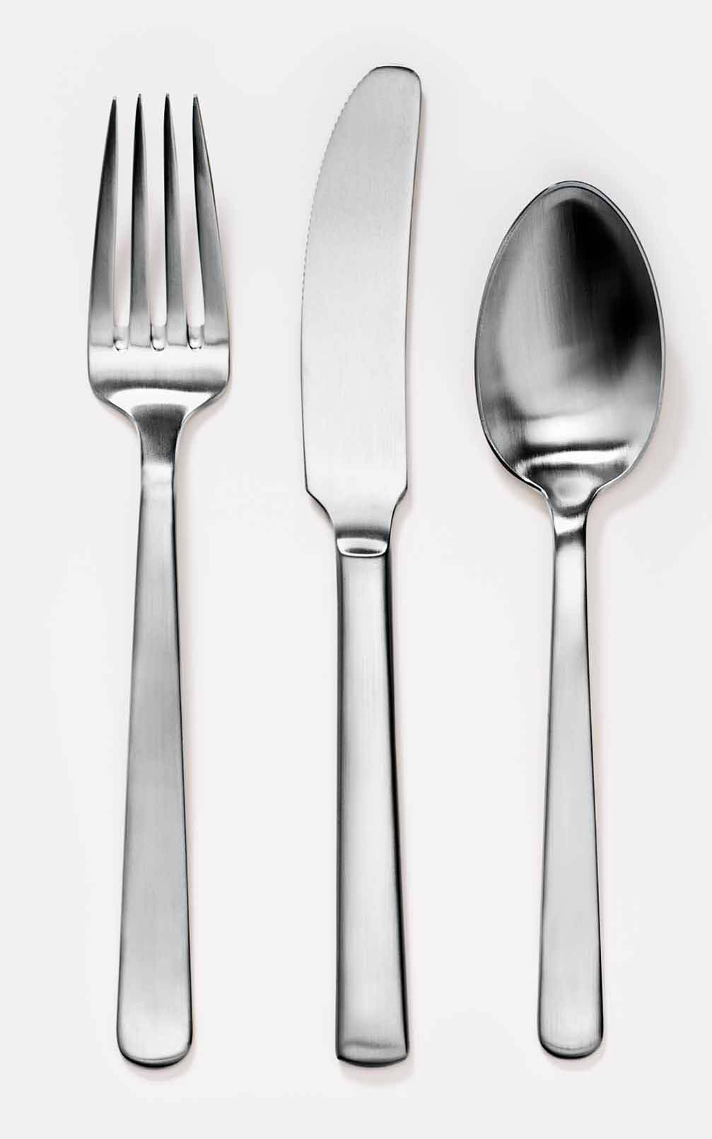 Grand Prix middagskniv, middagsgaffel og dessertske